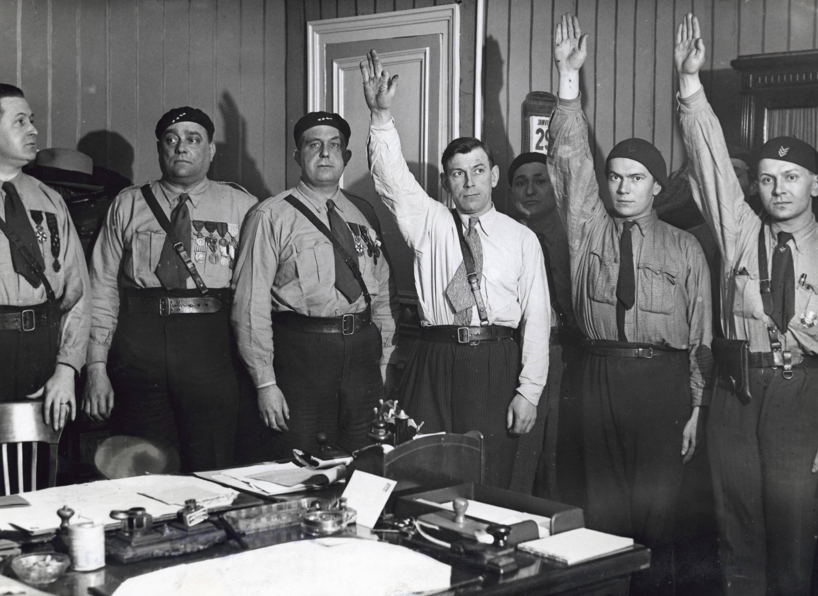 Het kader van de Franse fascisten (de "francisten"): Vlnr Marcel Bucard, Paul Lafitte en J.-B. LHerault. Enkele recruten brengen de Hitlergroet en dragen wapens, de hemden zijn blauw. Frankrijk, 30 januari 1934.